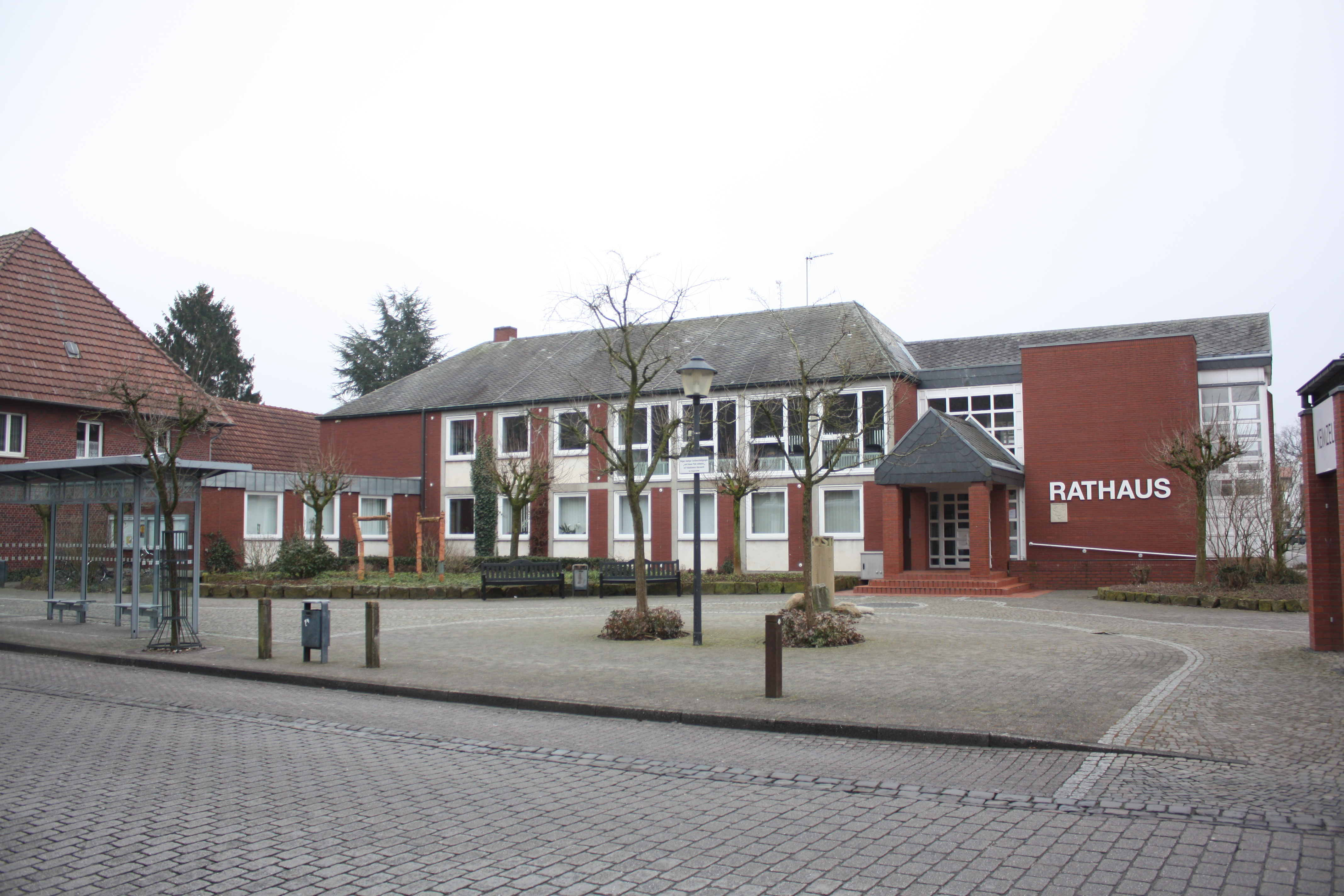 Rathaus Ostbevern